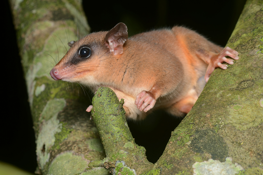 Didelphidae: Marmosa sp., Isla Colón, Bocas del Toro, Panama, Marmosa alstoni, Marmosa isthmica, Marmosa robinsoni or Marmosa zeledoni. Looks like image of Marmosa robinsoni in the HMW, Page 136.